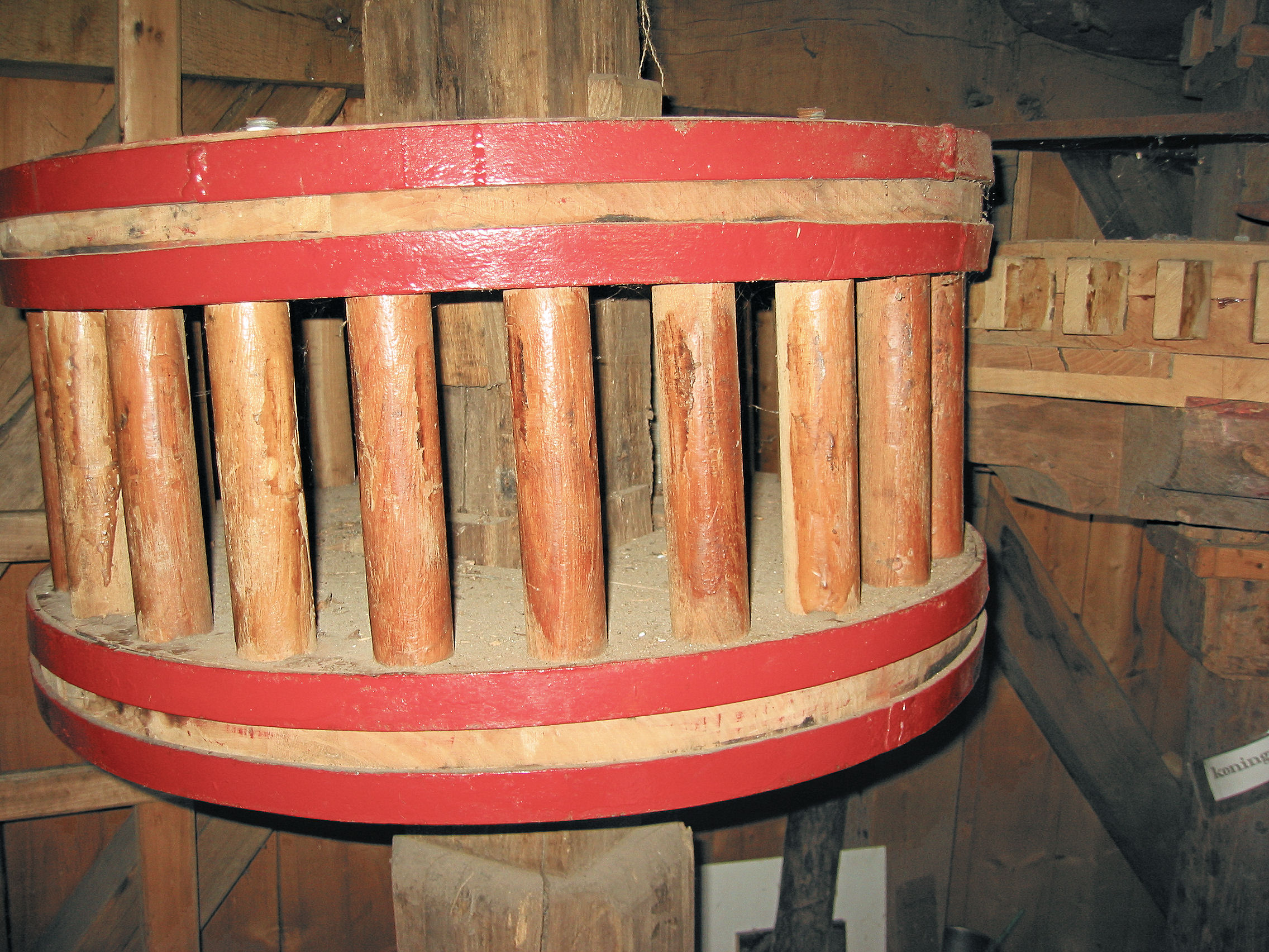 steenrondsel linker achtermolen vn de molen Tot Voordeel en Genoegen in Alphen aan de Maas, the Netherlands.